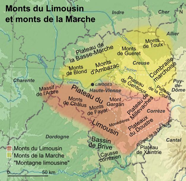 Carte de localisation des principaux massifs du Limousin.